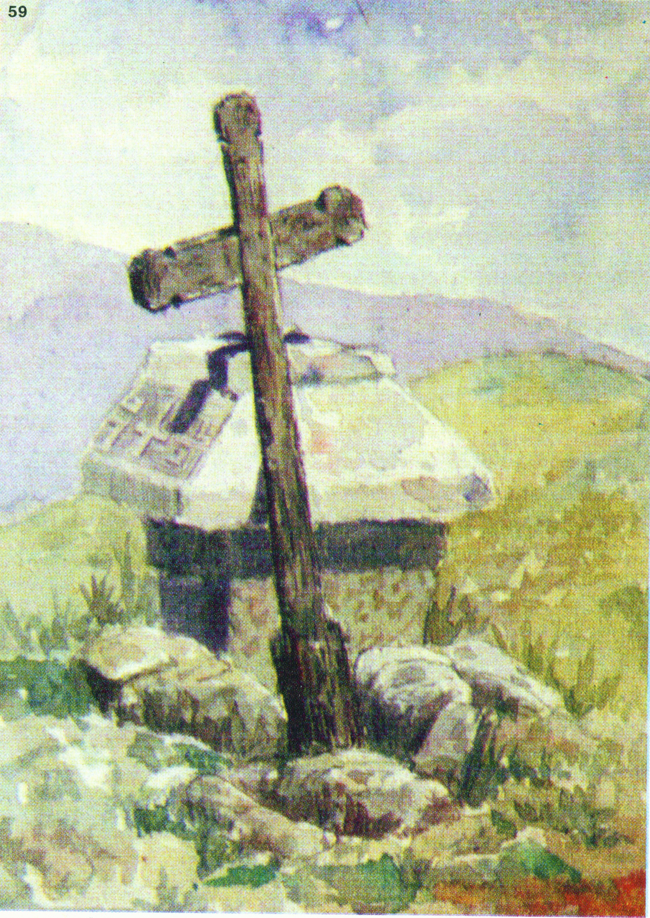 59. Оброчище на мегданчето в с. Лютиброд, Врачанска околия. Върху постамент от варовит туф, забит в земята, е сложен с широкото надолу мраморен, във византийски стил капител. Върху едната страна на капитела са изваяни гръцки орнаменти - меандри, и между тях кръст. На тази група от камъни, напомняща олтарен престол, е облегнат висок кръст, издялан грубо с брадва от дъбово дърво, кован с гвоздеи, който по всяка вероятност е бил по-рано забит в земята. Това се вижда от дебелия полуизгнил край на долното му крило. Мегданчето, гдето е направено оброчището, се намира сред селото на най-високото място, на един от баирите, върху който е заселено. Недалеч от оброчището стърчи камбанария, построена от дъбови греди. В с. Лютиброд църква няма; черкуват се из околните села, отгдето на известни празници дохождат свещеници и служат на оброчището. Тук селяните се сбират да се молят за дъжд, колят курбан и пр. Скициран през юни 1916 г. (Т. 2, табл. I.)